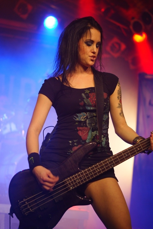 Karin Axelsson von Sonic Syndicate, We rule the night Tour 2010, Matrix Bochum